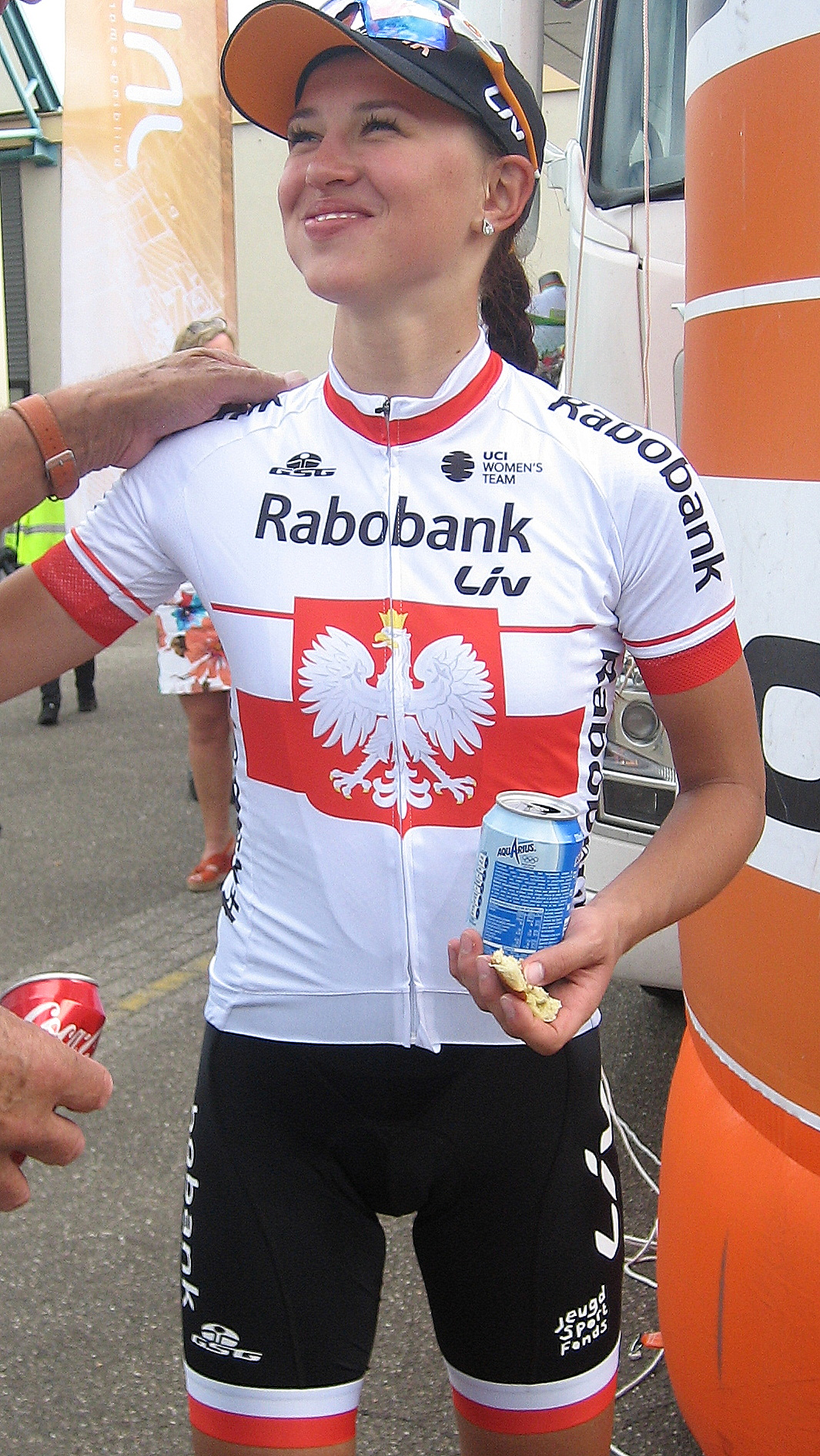 Katarzyna Niewiadoma (Rabo-Liv) na overwinning 3e etappe Holland Ladies Tour 2016